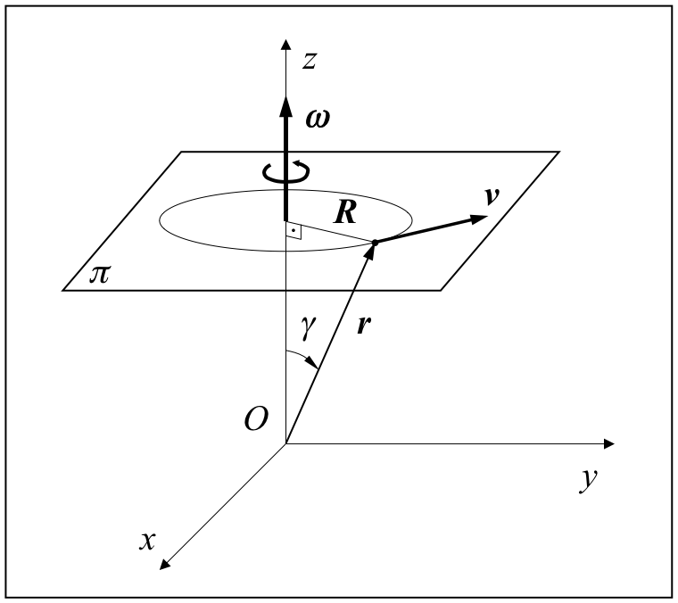 Higidura zirkular uniformearen azterketarako eskema.